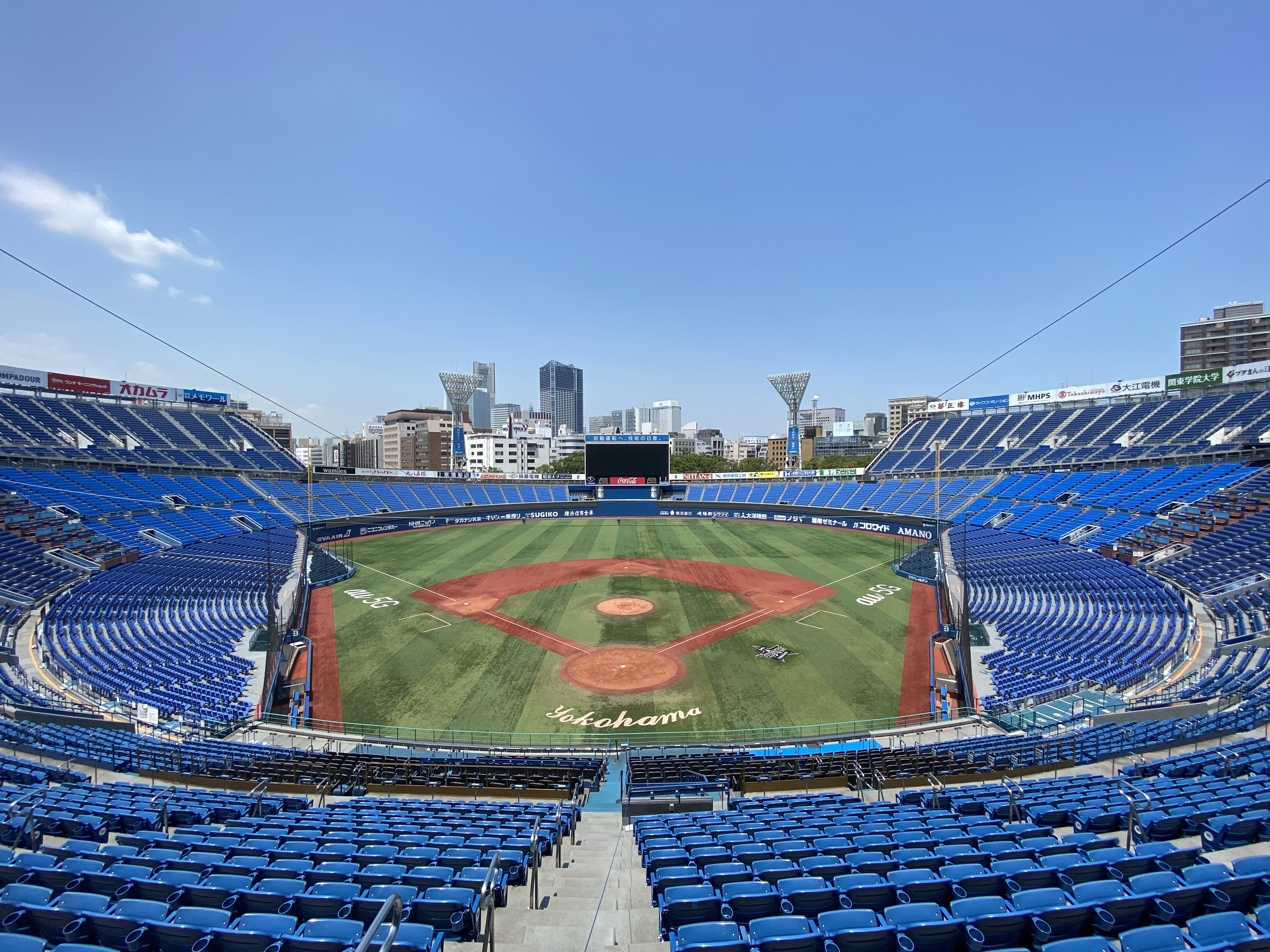 横浜スタジアム全景